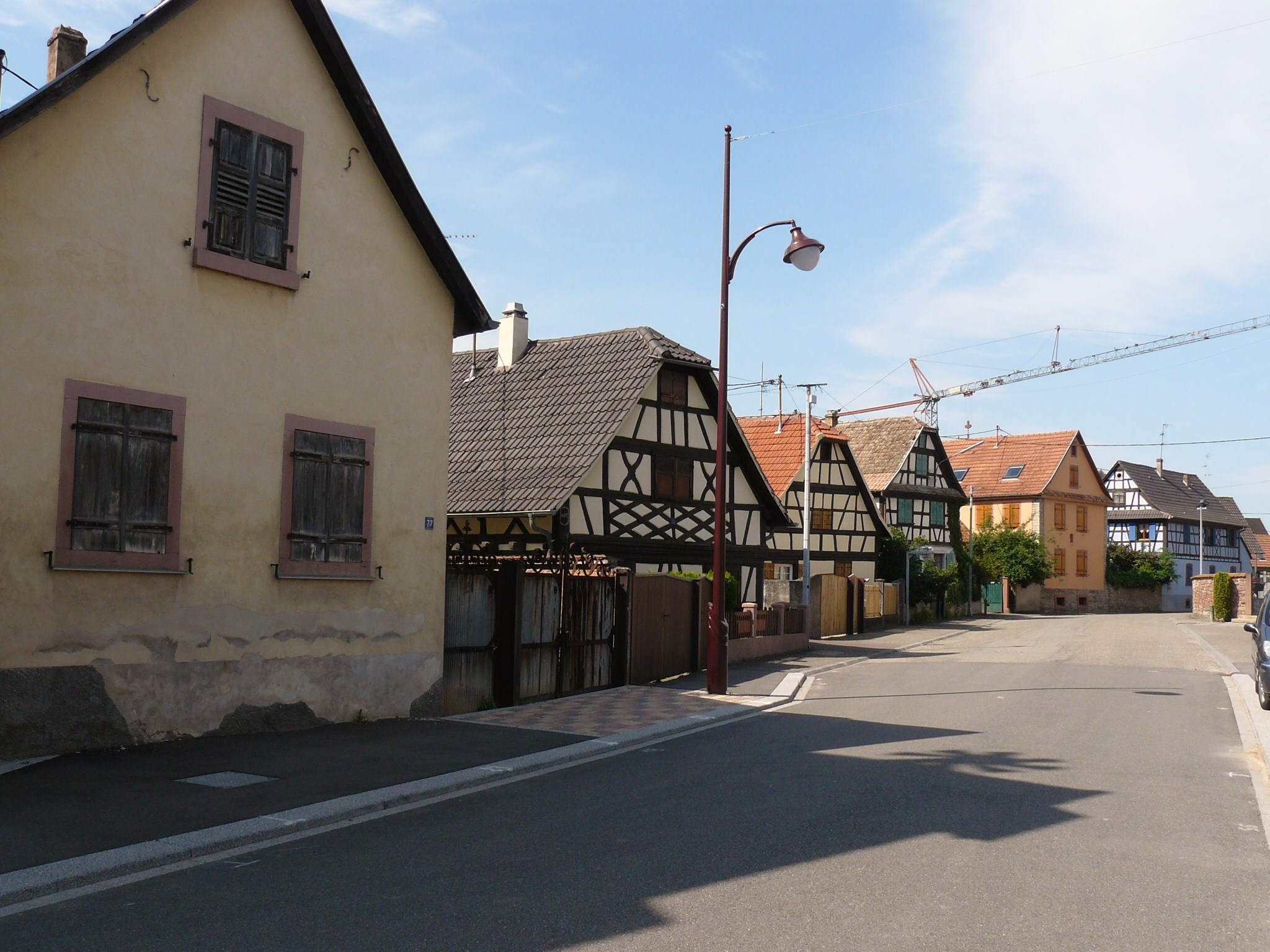 Ensemble de maisons à colombages situées das la rue principale